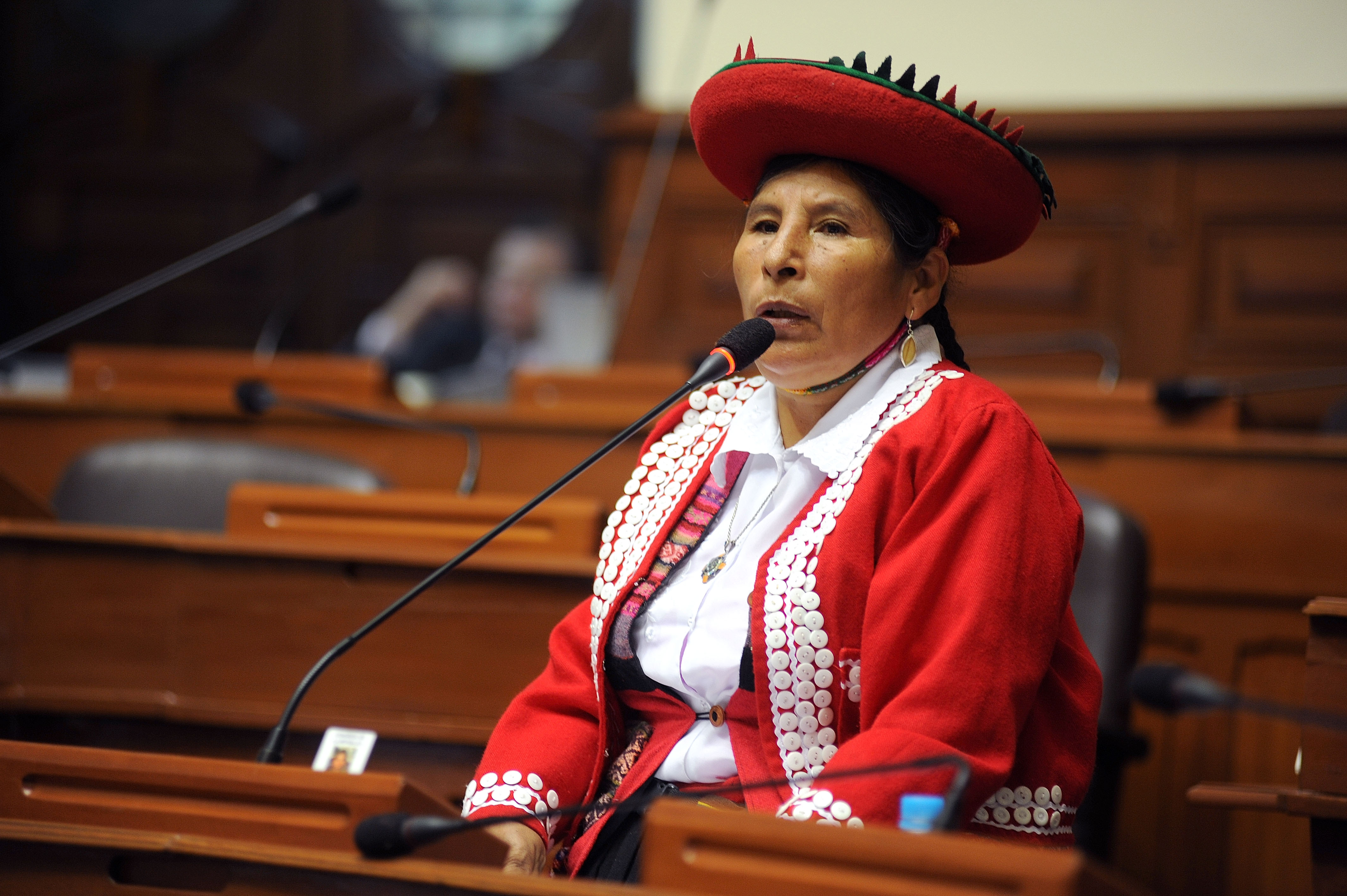 La legisladora Hilaria Supa Huamán expresa su posición en el debate parlamentario realizado esta tarde por el Pleno congresal